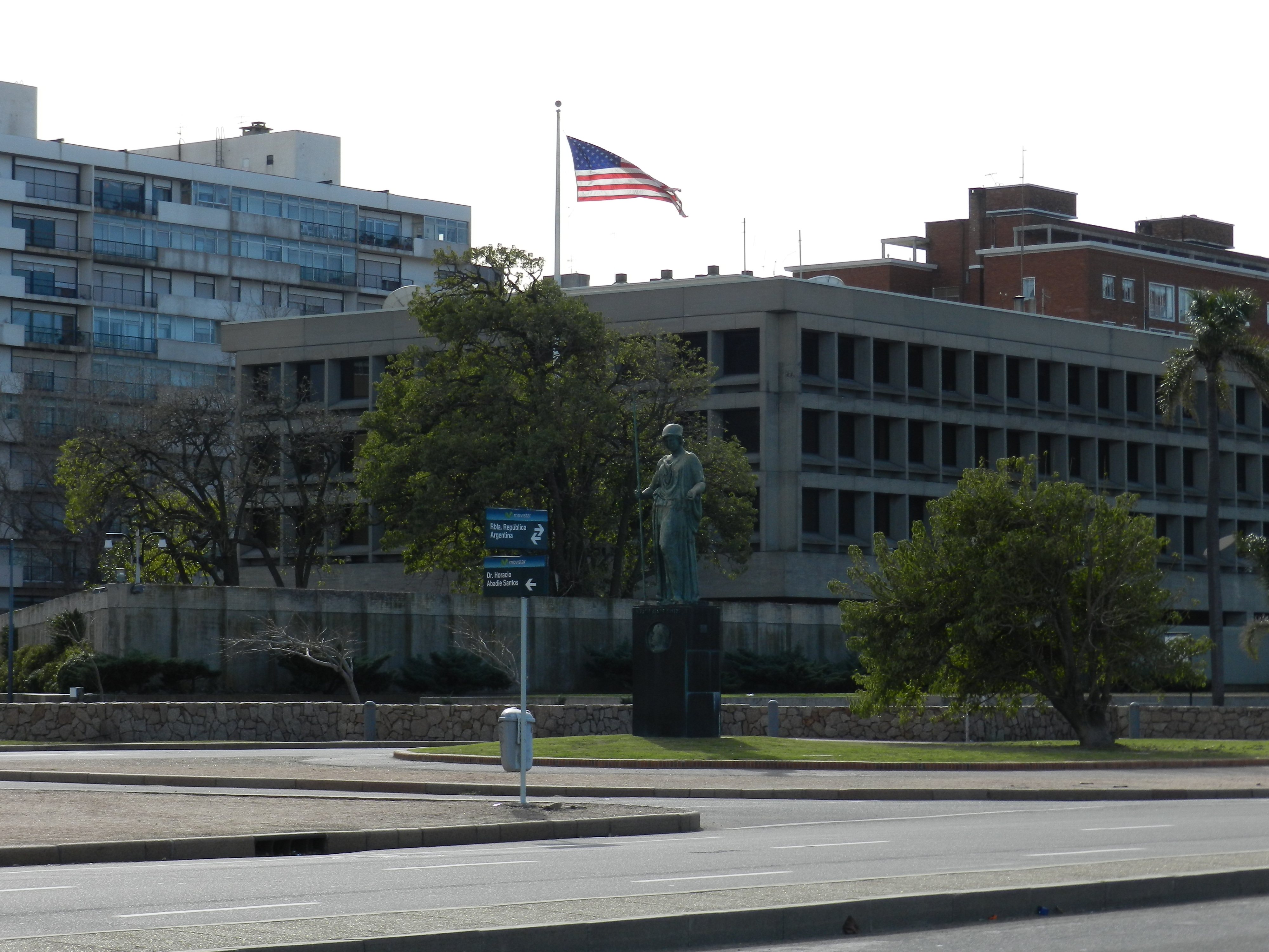 Ramblas de Montevideo.